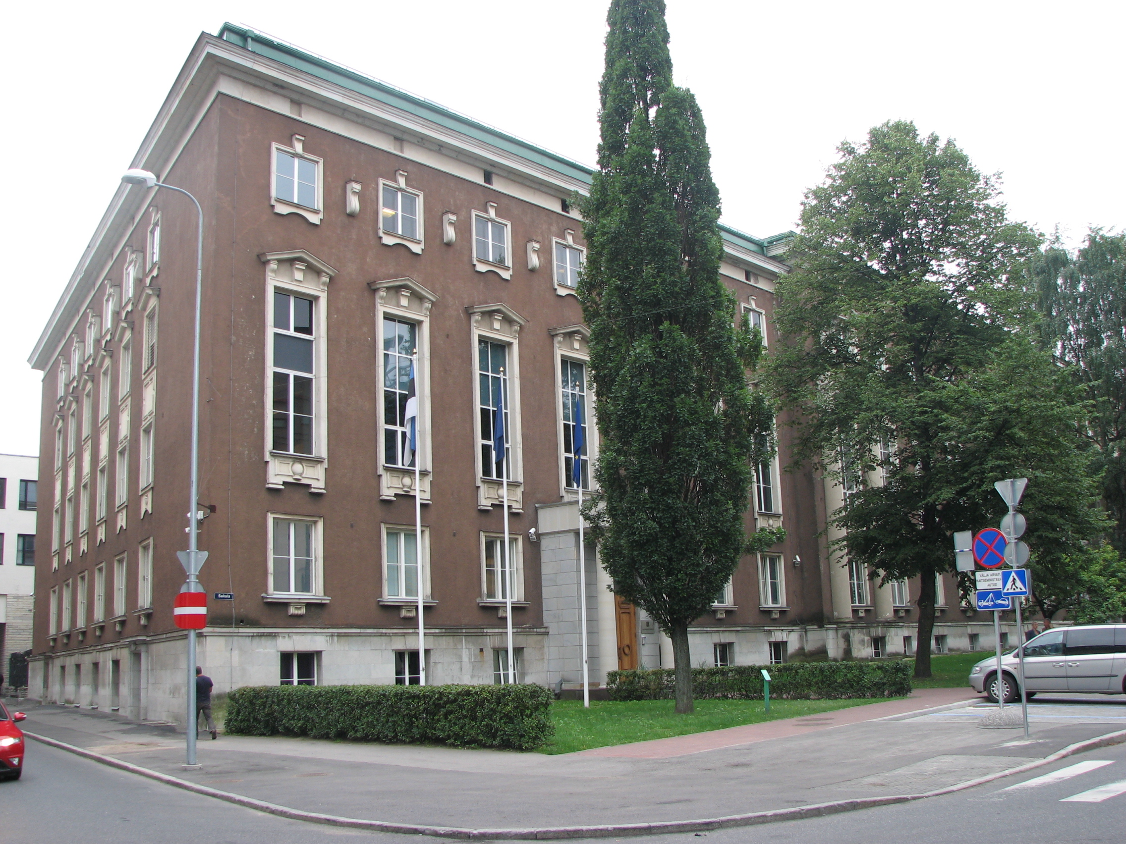 Eesti Vabariigi Kaitseministeeriumi hoone Sakala 1 ehitati aastail 1940-1947